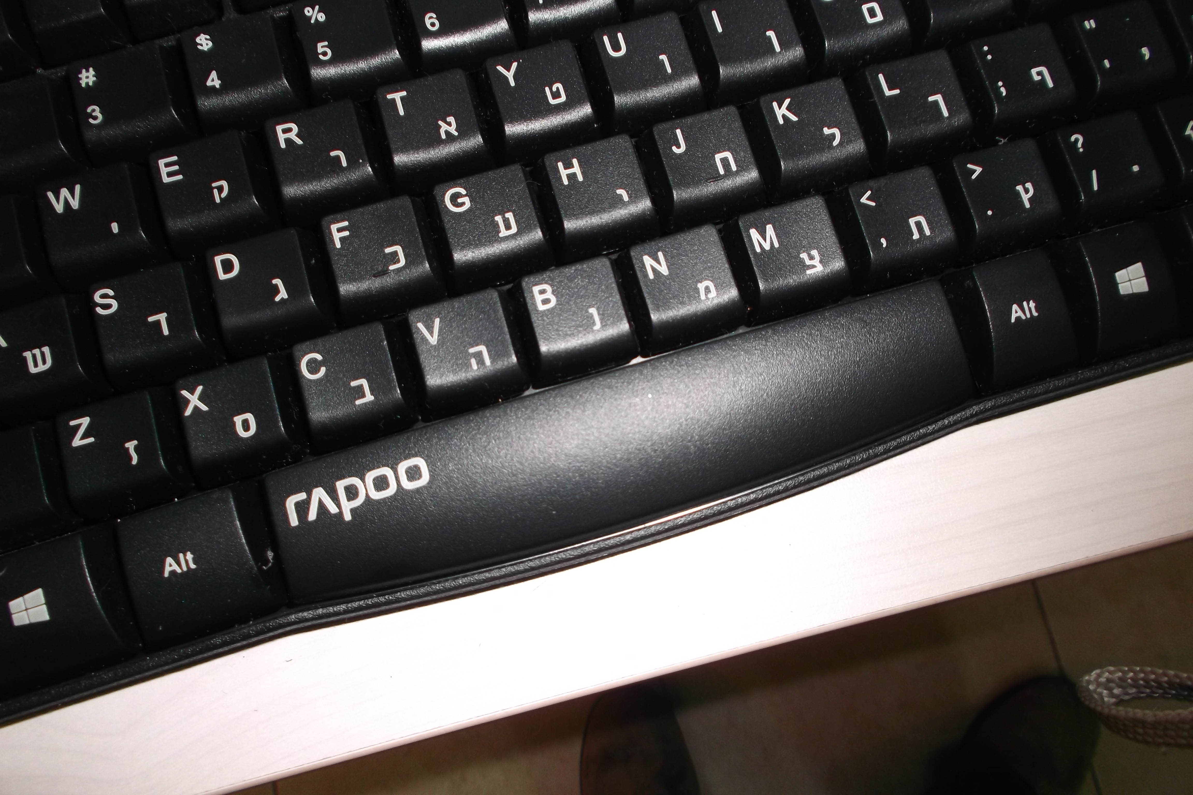 עוד מקש